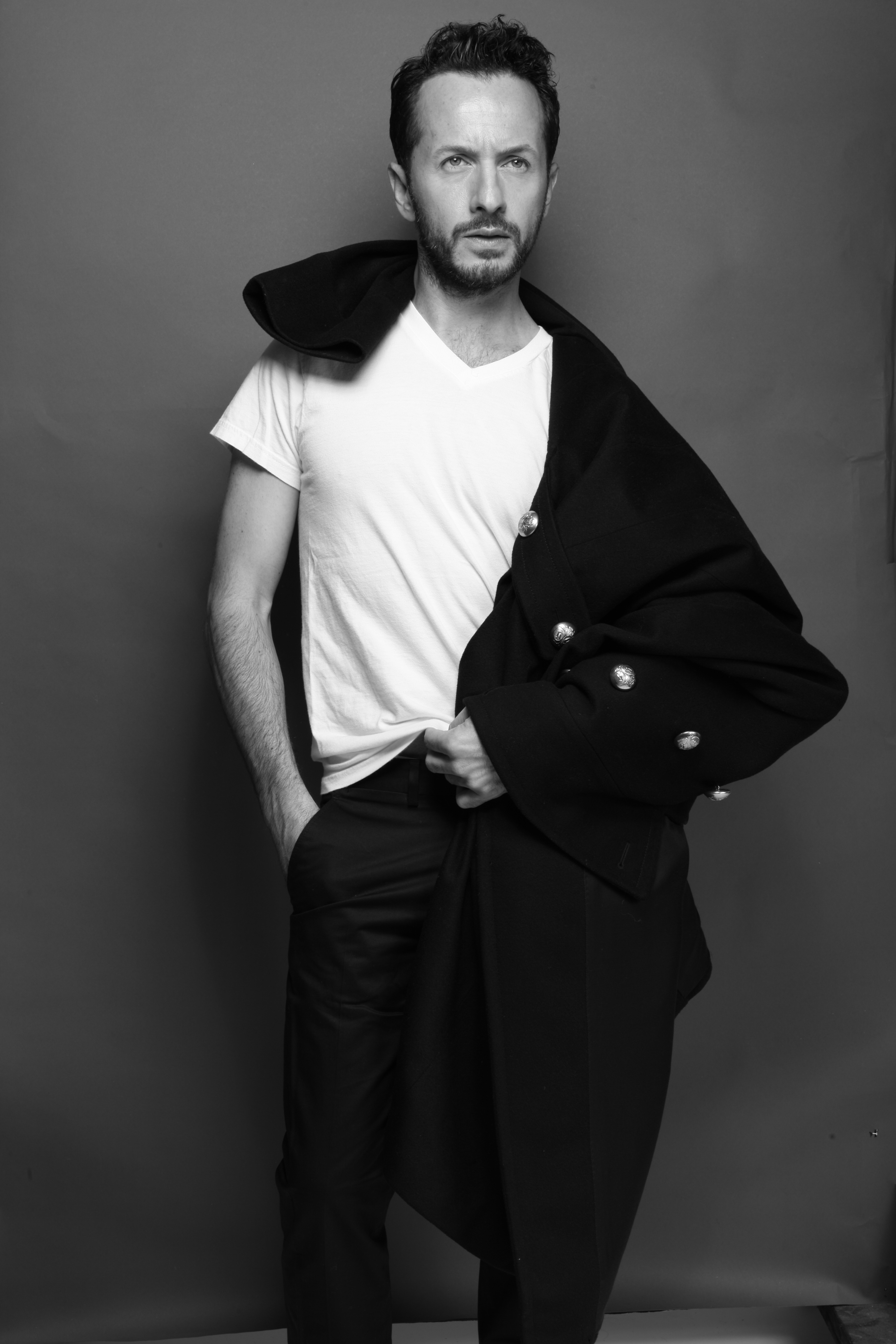 Director de Contempo Models, agencia de modelos mas importante en México.